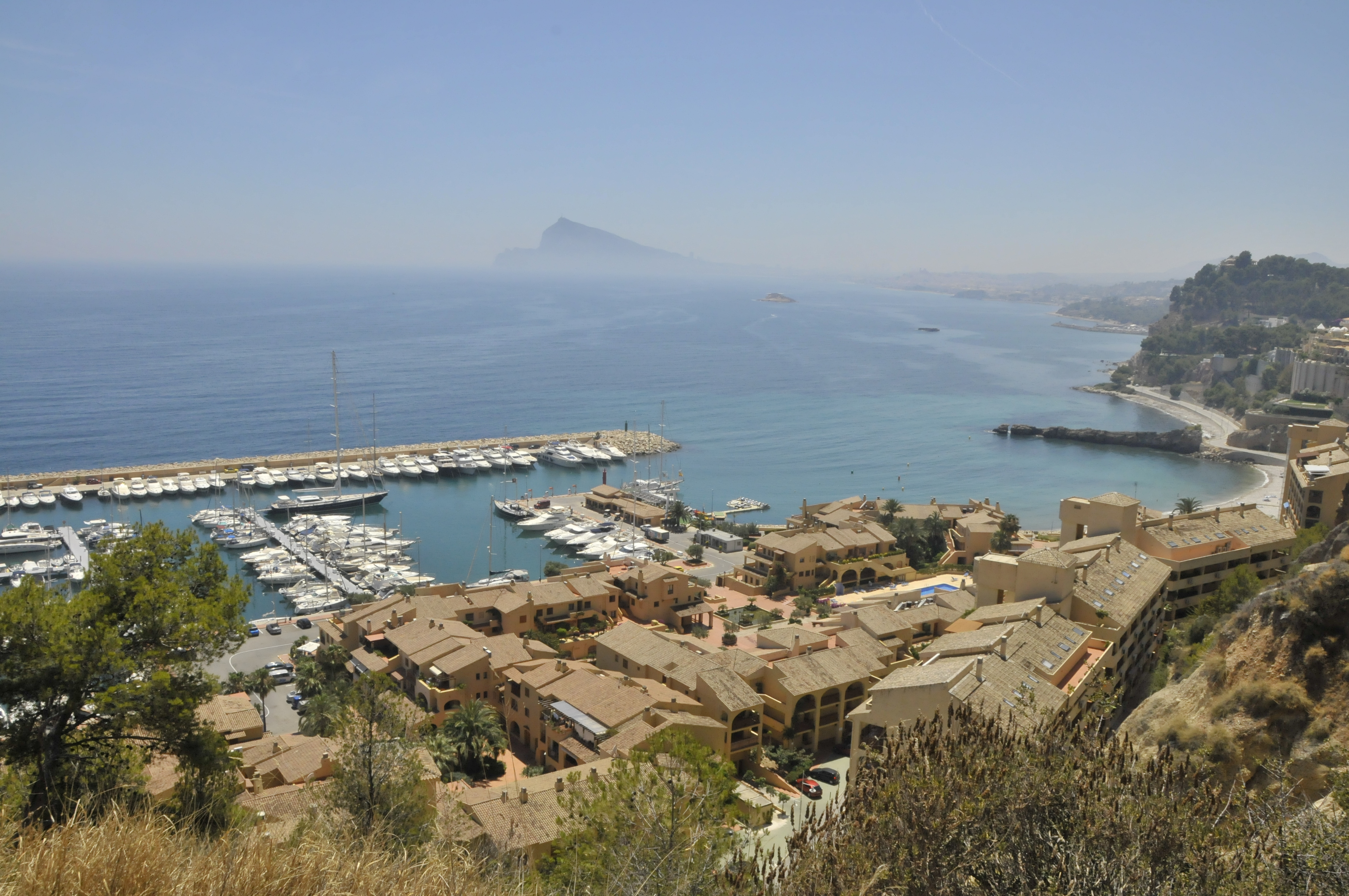 Altea, Spanien, Yachthafen